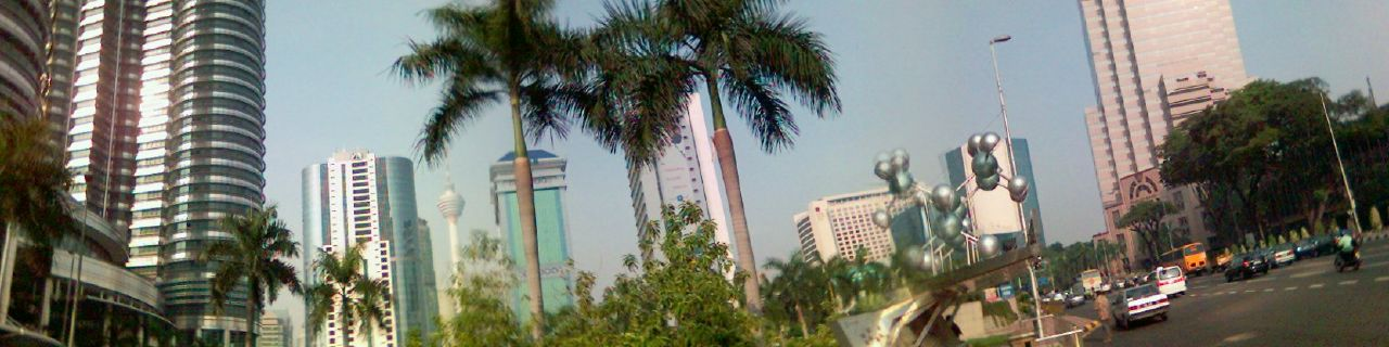 Jalan Ampang panorama